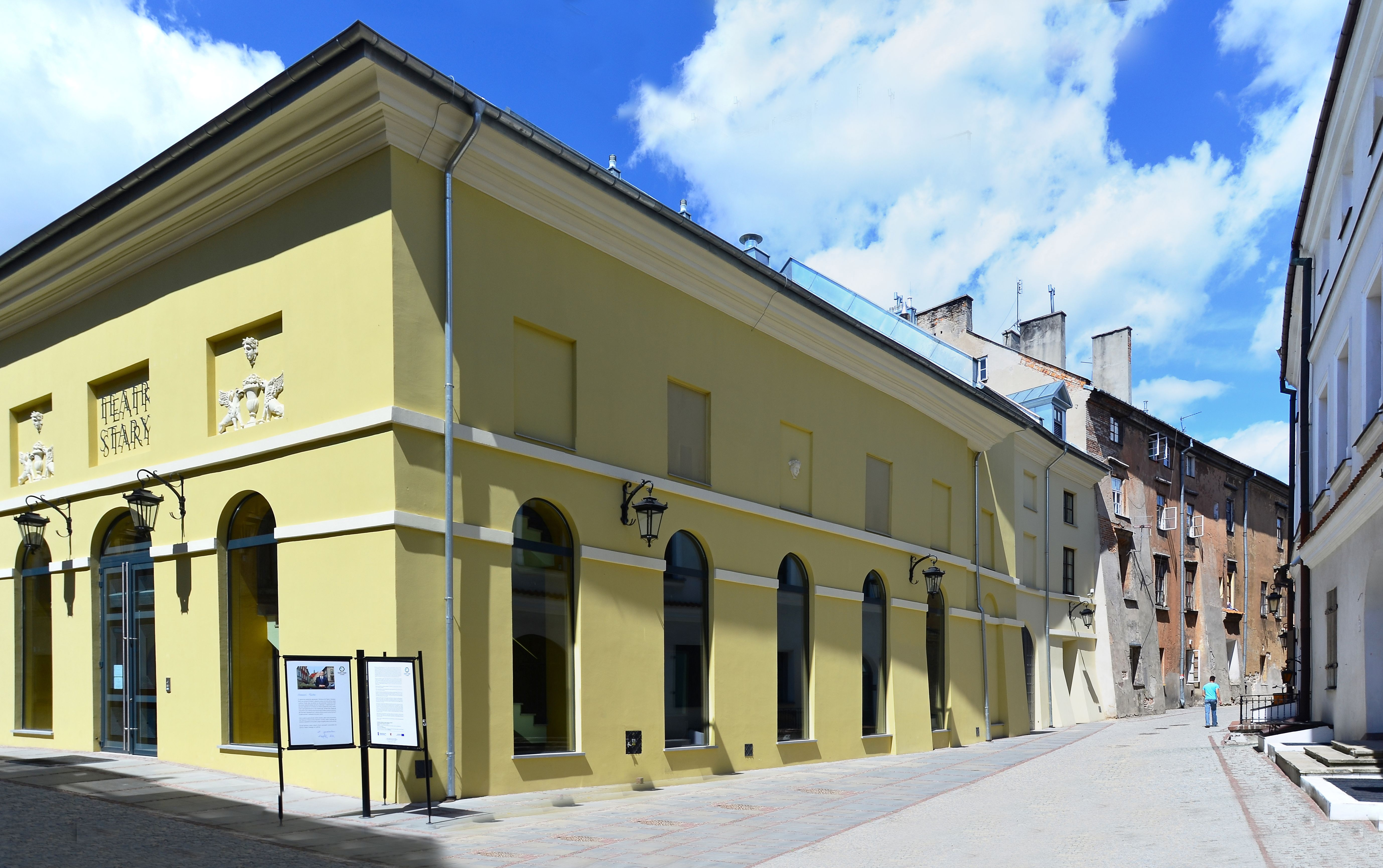 Budynek Teatru Starego w Lublinie, odrestaurowany w 2011 roku. Wpisany do rejestru zabytków pod nr. A/224 z 14.02.1967. Obraz poprawiony programem ShiftN